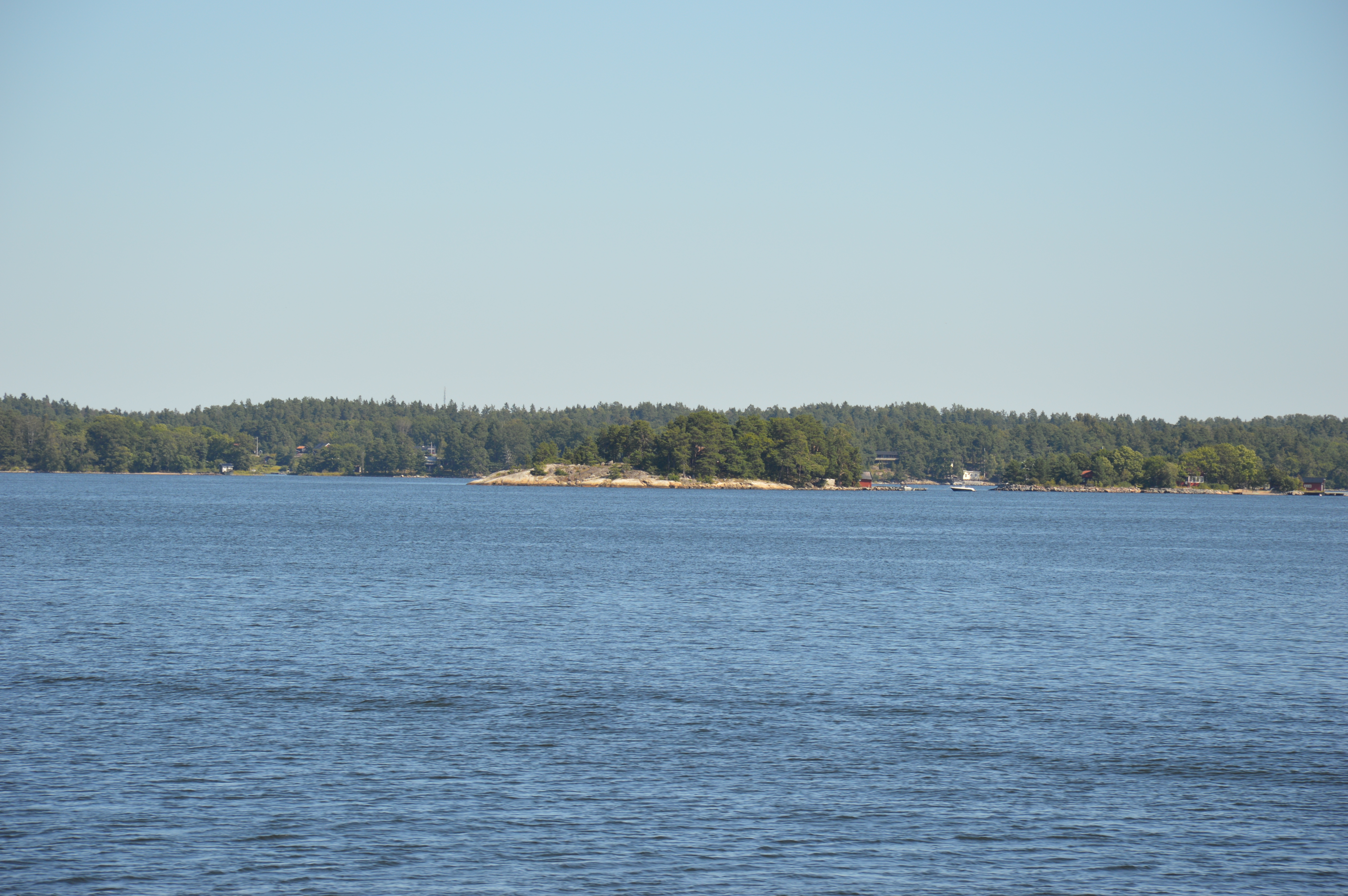 Insel Storholmen